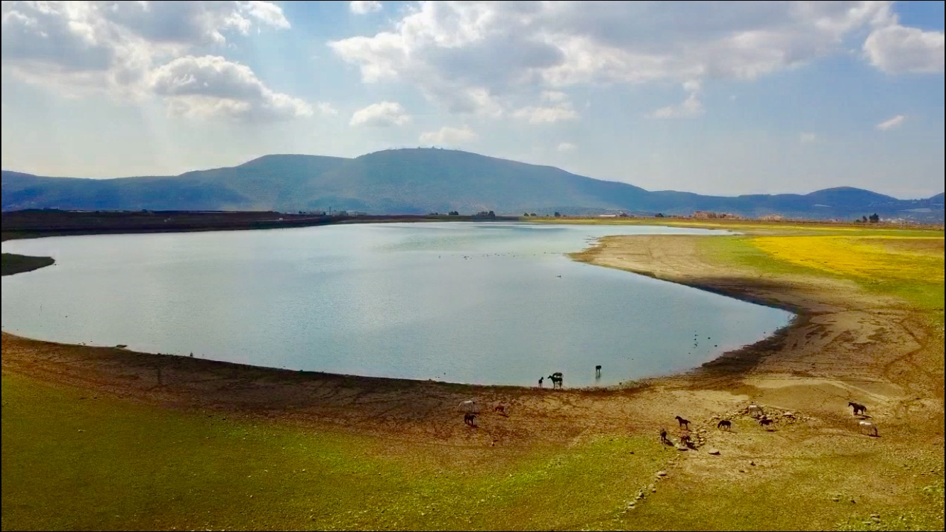 (אגם דלתון-במערבית ליישוב דלתון (בגליל העליון אשר מתמלא מ מיי גשמים במהלך השנים, ברקע האגם רכס הר מירון